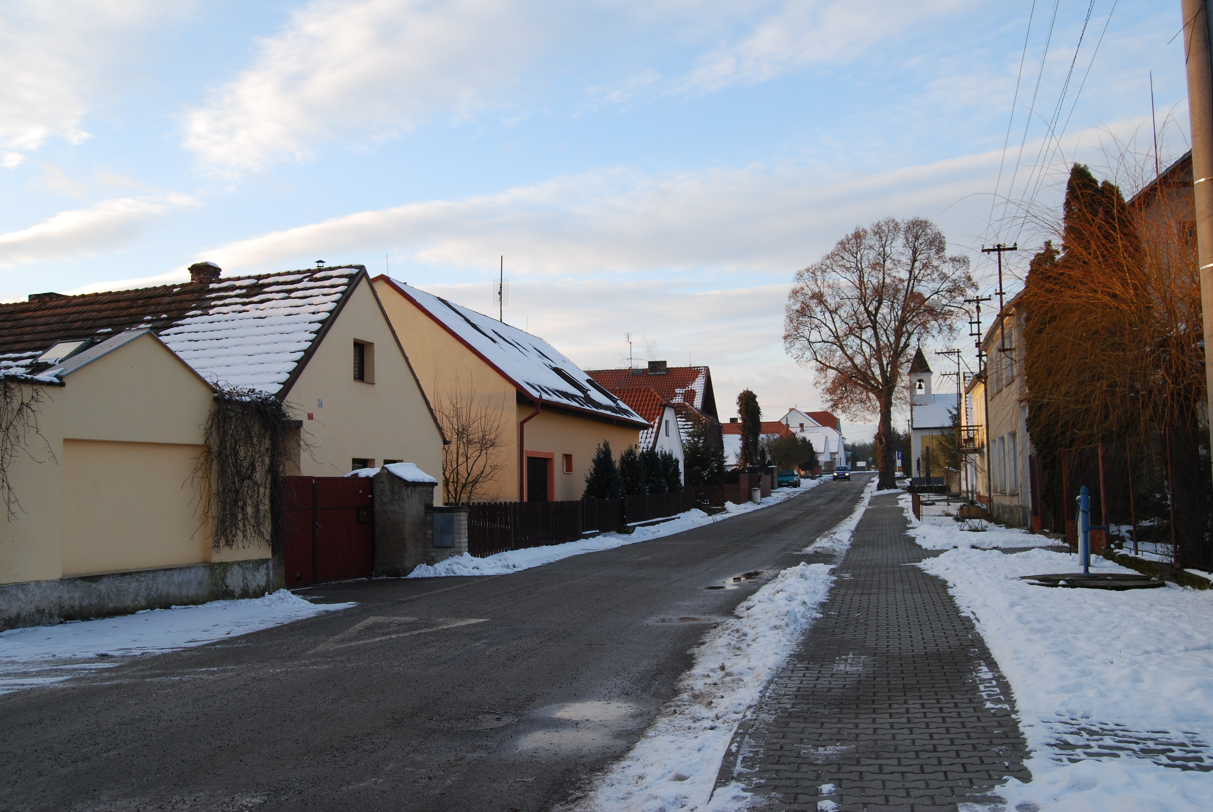 Pohled na obec směrem k návesní kapli. Zvíkovské Podhradí. Okres Písek . Česká republika.